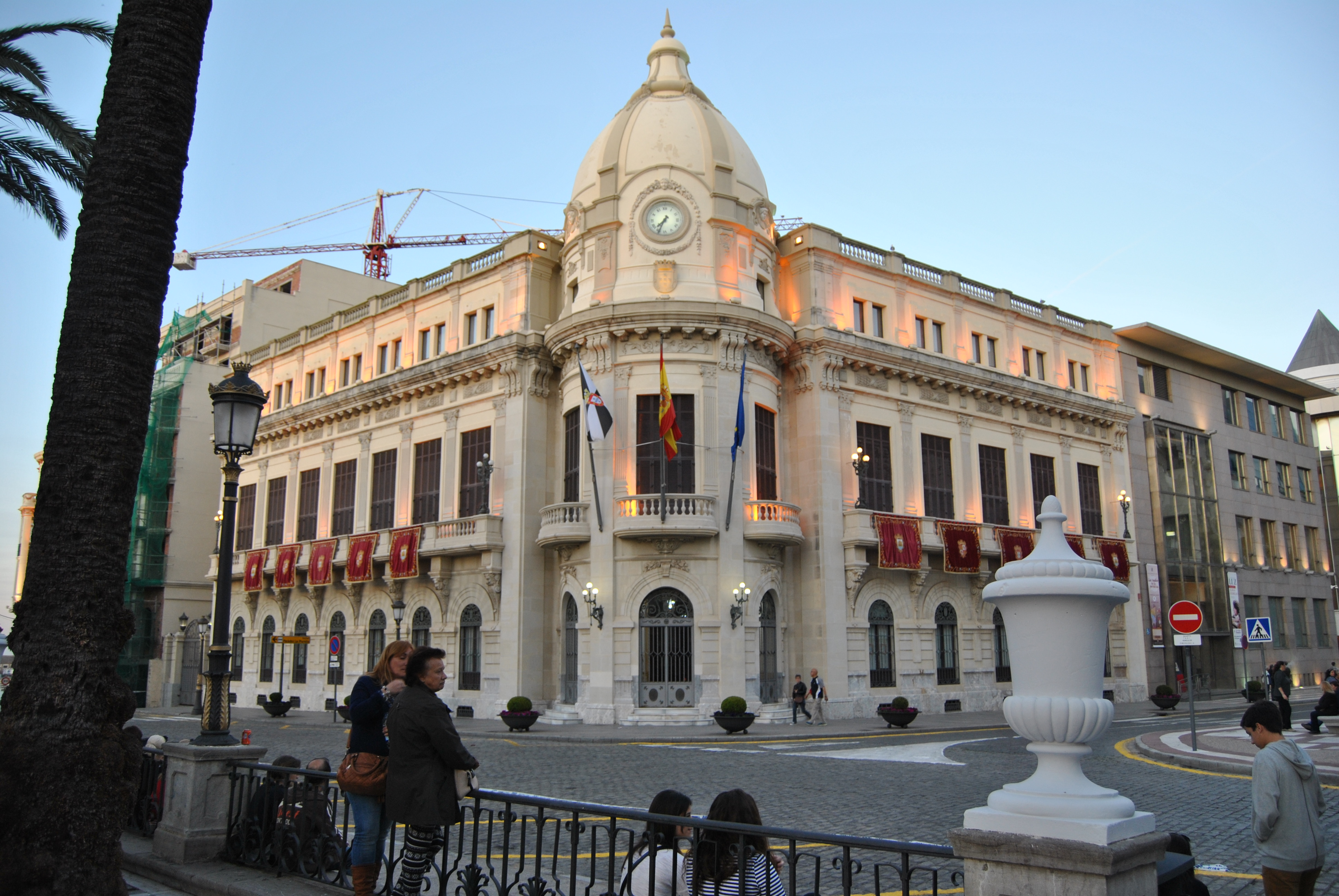 Palacio de la Asamblea de Ceuta